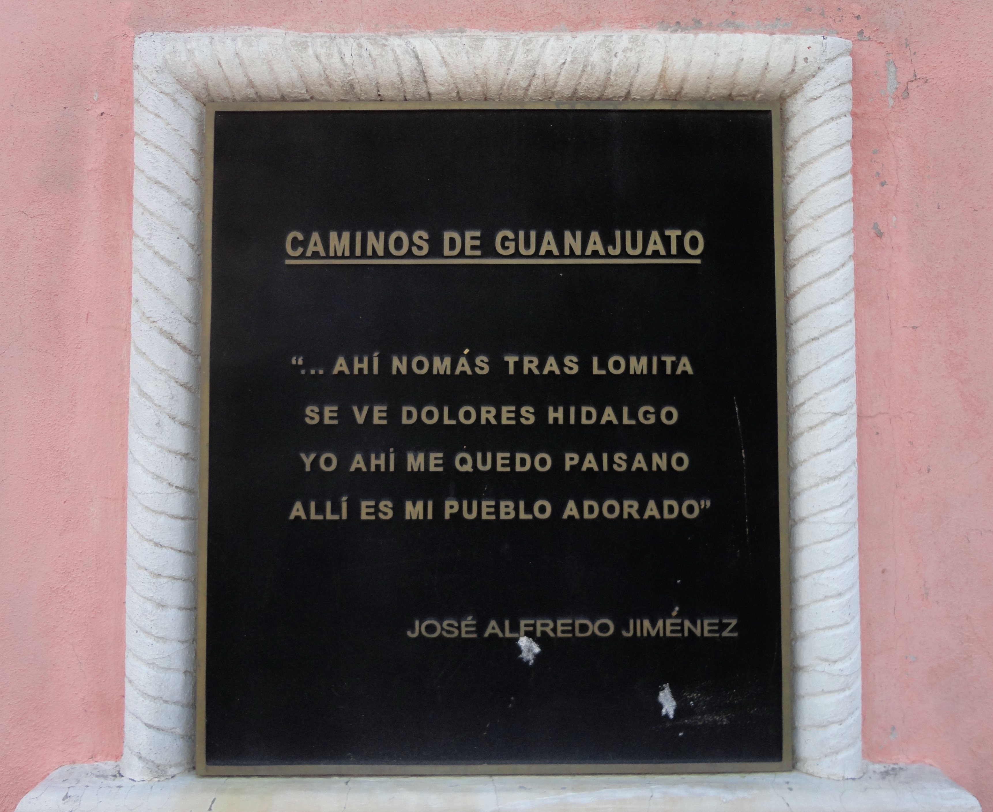 Caminos de Guanajuato, Dolores Hidalgo, Guanajuato, México.